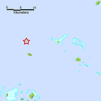 Lea faka-Tonga: no original description